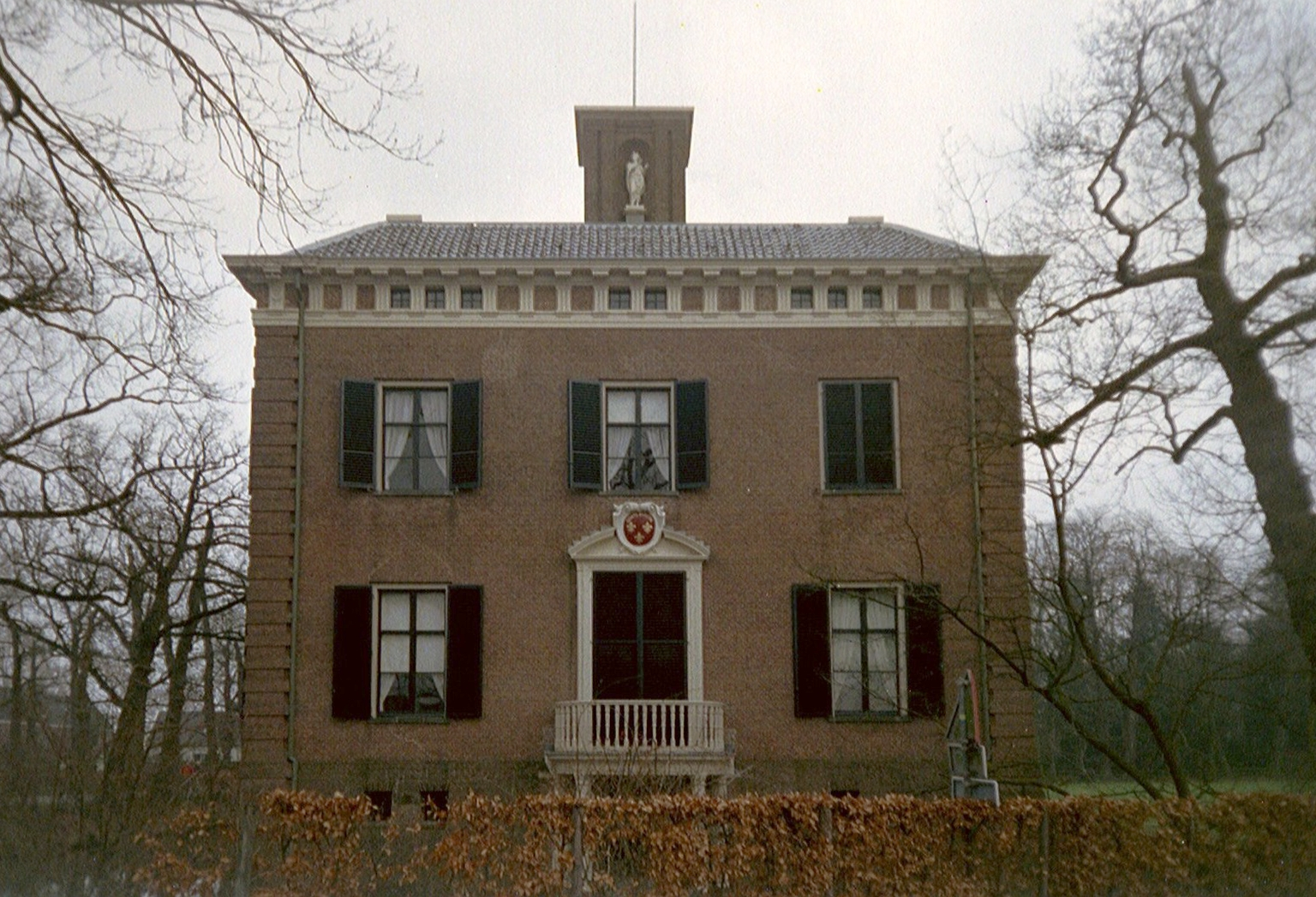 Gunterstein, Zandpad 48, Breukelen. Foto genomen op 6 maart 2004 en geupload door maker.